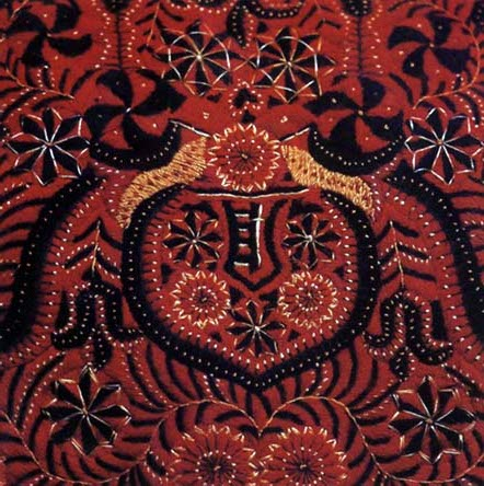 Gyapjúfonállal hímzett juhbőrmelles részlete, szűcsmunka (Vista, v. Kolozs m., 20. sz. első fele)